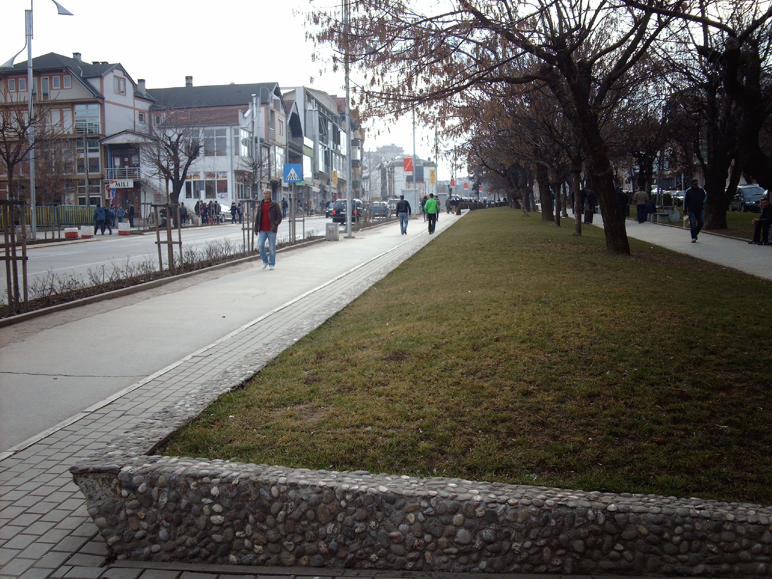 Disa Prej Gjelbrimeve ne Qytet